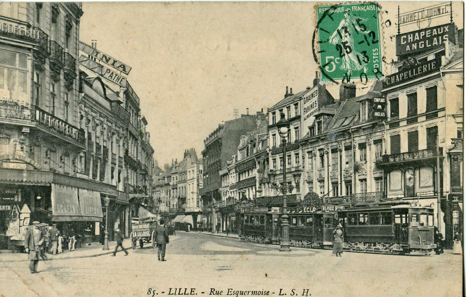 Carte postale ancienne éditée par L. S. H., n°85 :LILLE - Rue Esquermoise